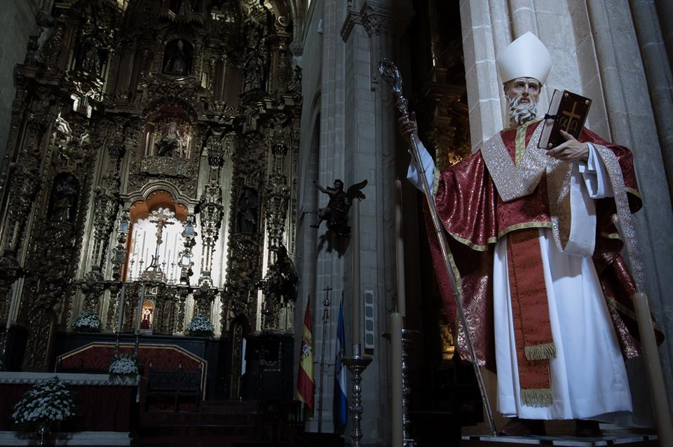 Imagen de San Dionisio Areopagita